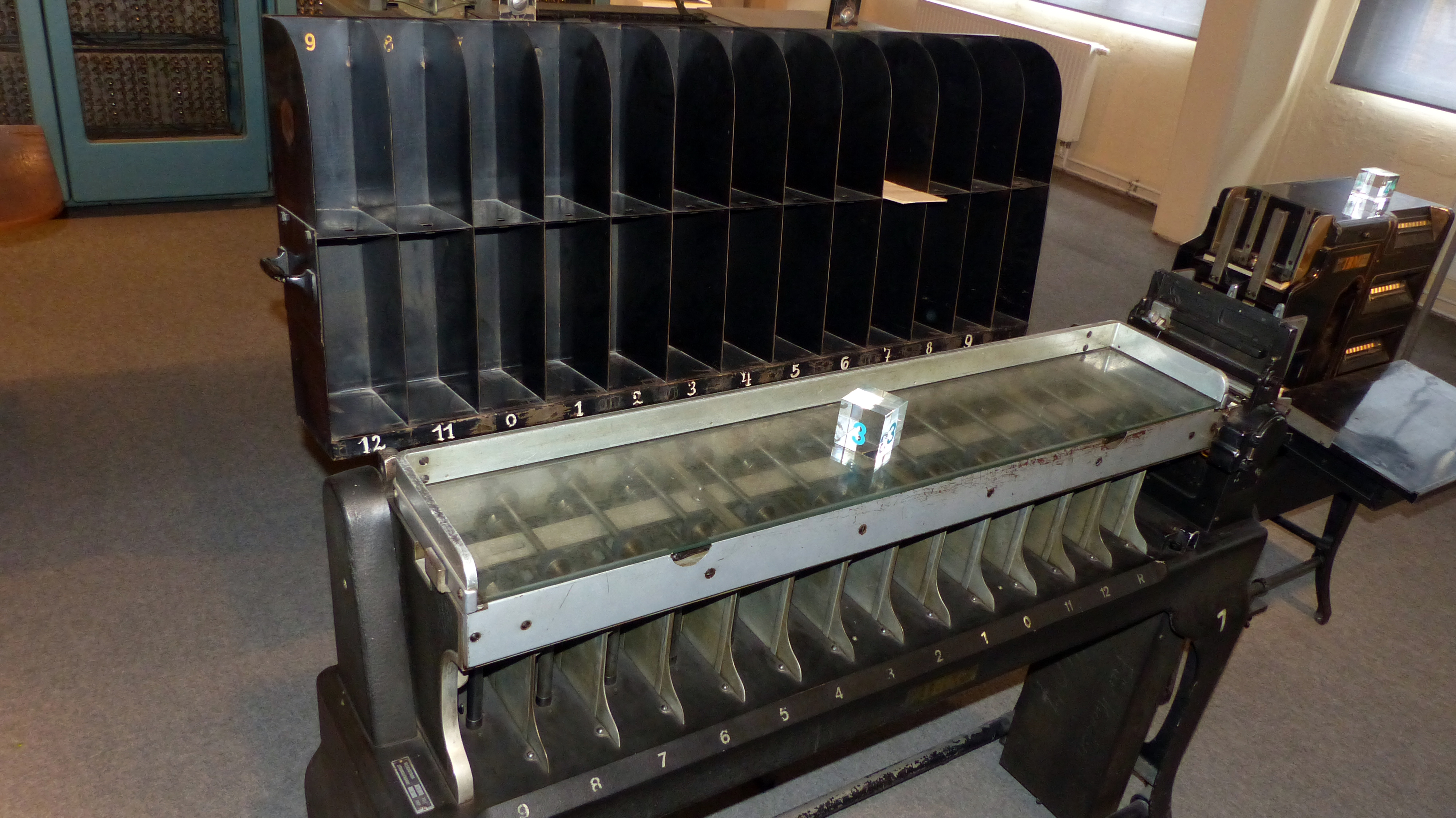 Lochkartensortierer IBM 080, 1925 - Lochkartenablageregal Hollerith, um 1925; Exponate in den Technischen Sammlungen Dresden